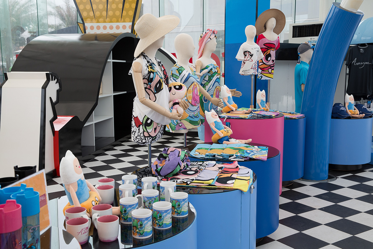 CNA Retail